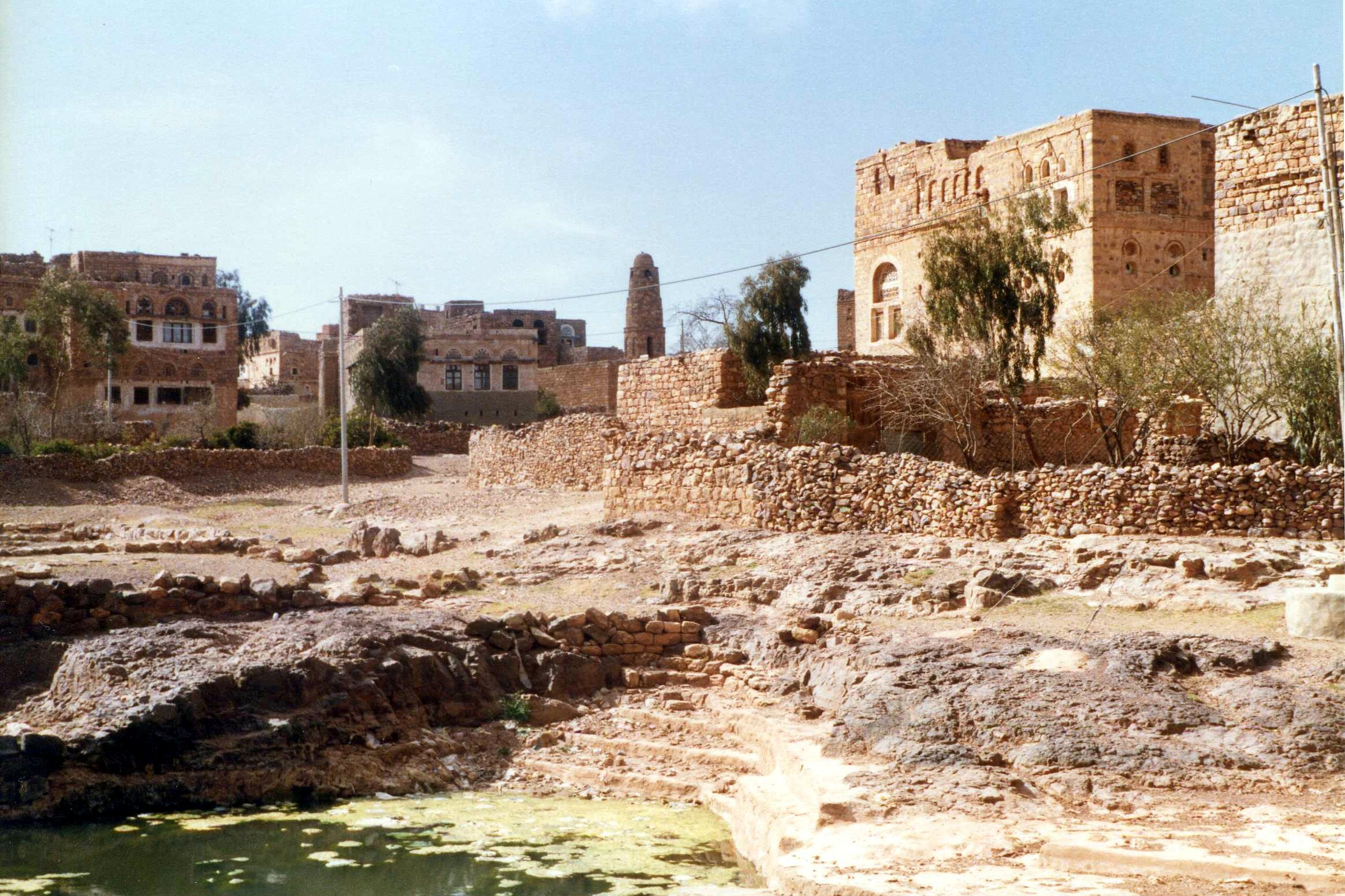 Kawkaban